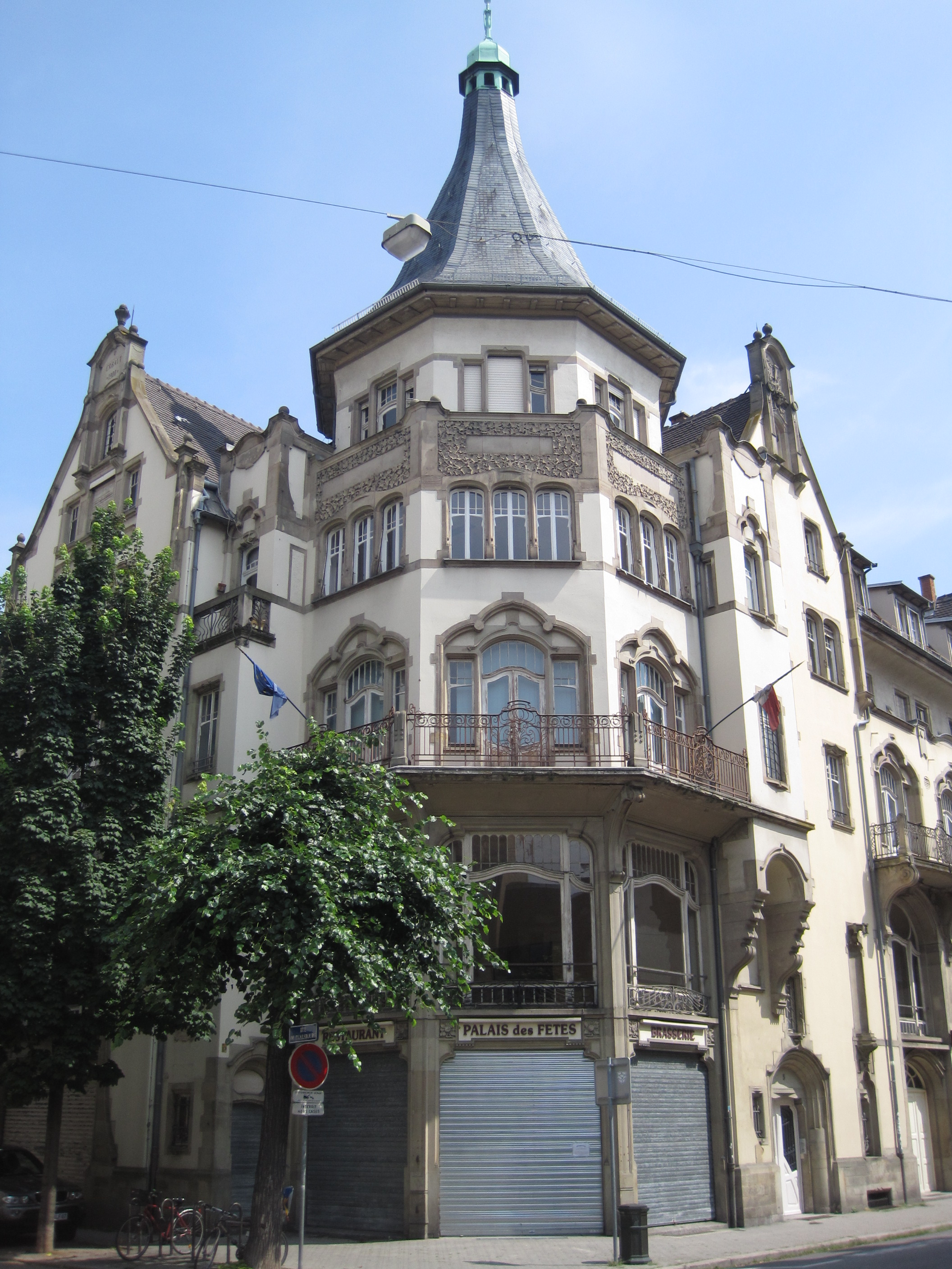 Le Palais des Fêtes de Strasbourg après ravalement